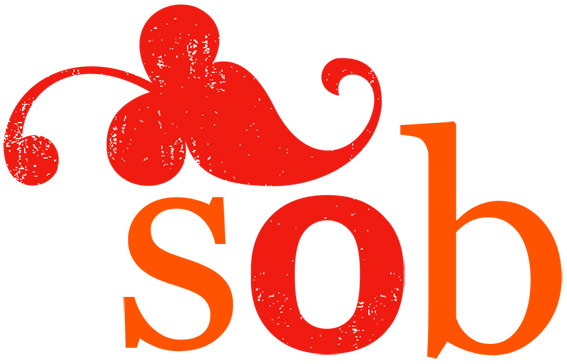 Logo SOB